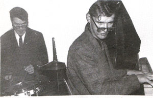 Juha Vainio (oikealla) tuuraajan tuuraajana Fennia-ravintolassa